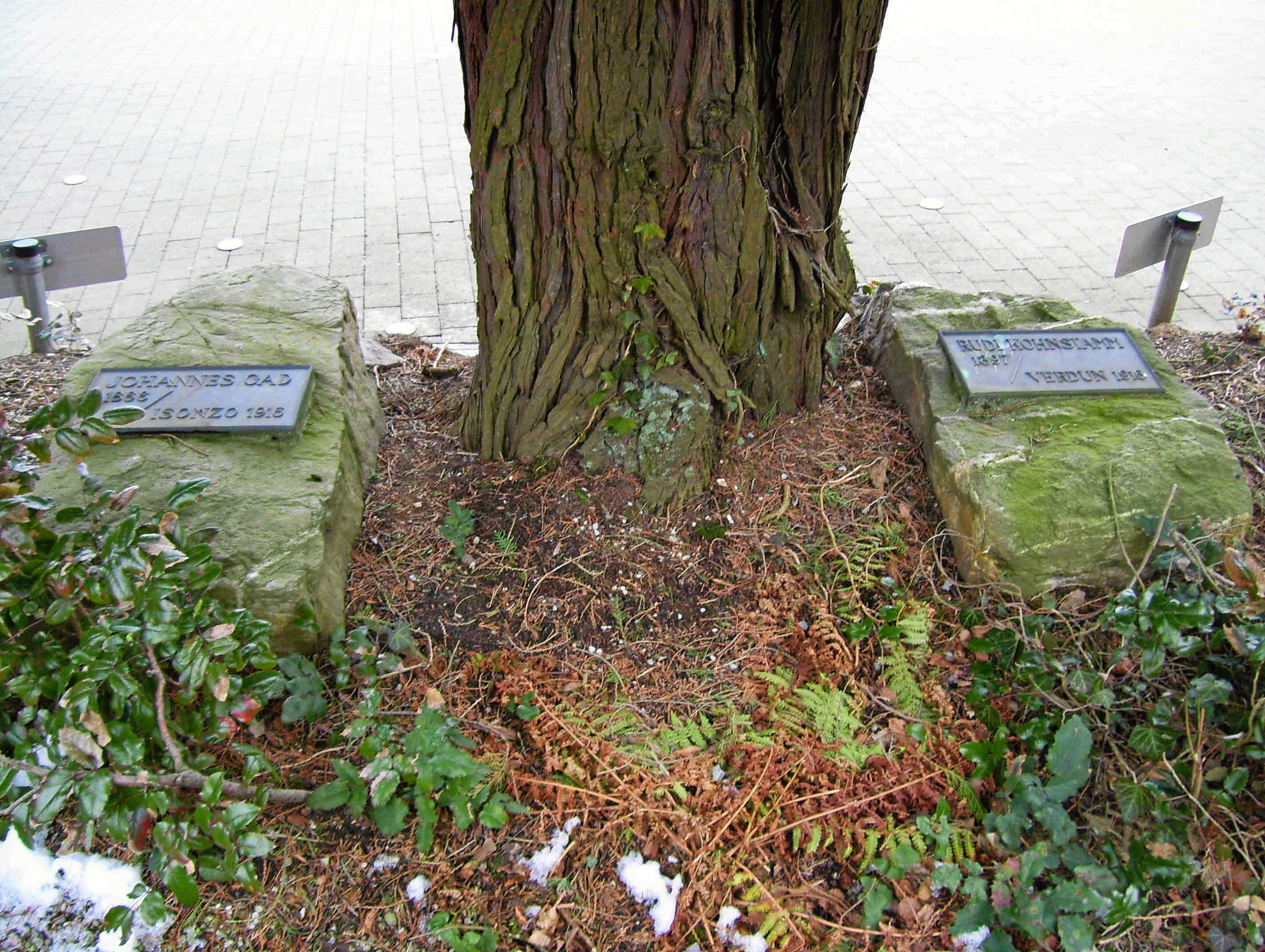 Die Gräber von Johannes Gad (1888-1916 Isonzo) und Rudi Kohnstamm (1897-1916 Verdun) auf dem städtischen Friedhof in Königstein im Taunus